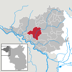 Perleberg in Brandenburg (Country) - District Prignitz